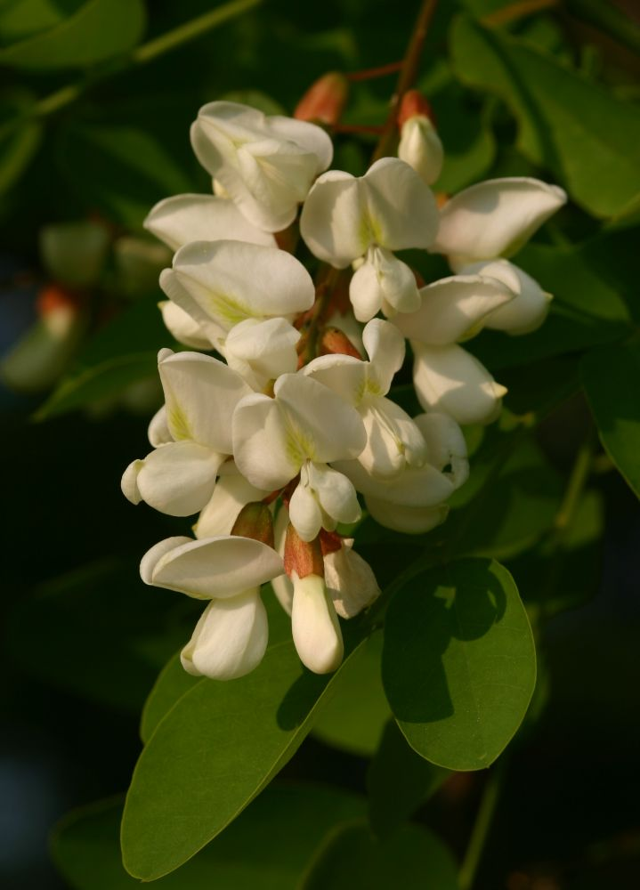 Akác (Robinia pseudoacacia), Mekszikópuszta, Magyarország